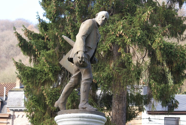 Theodore Baron, statue à Namur - oeuvre de Charles Van der Stappen